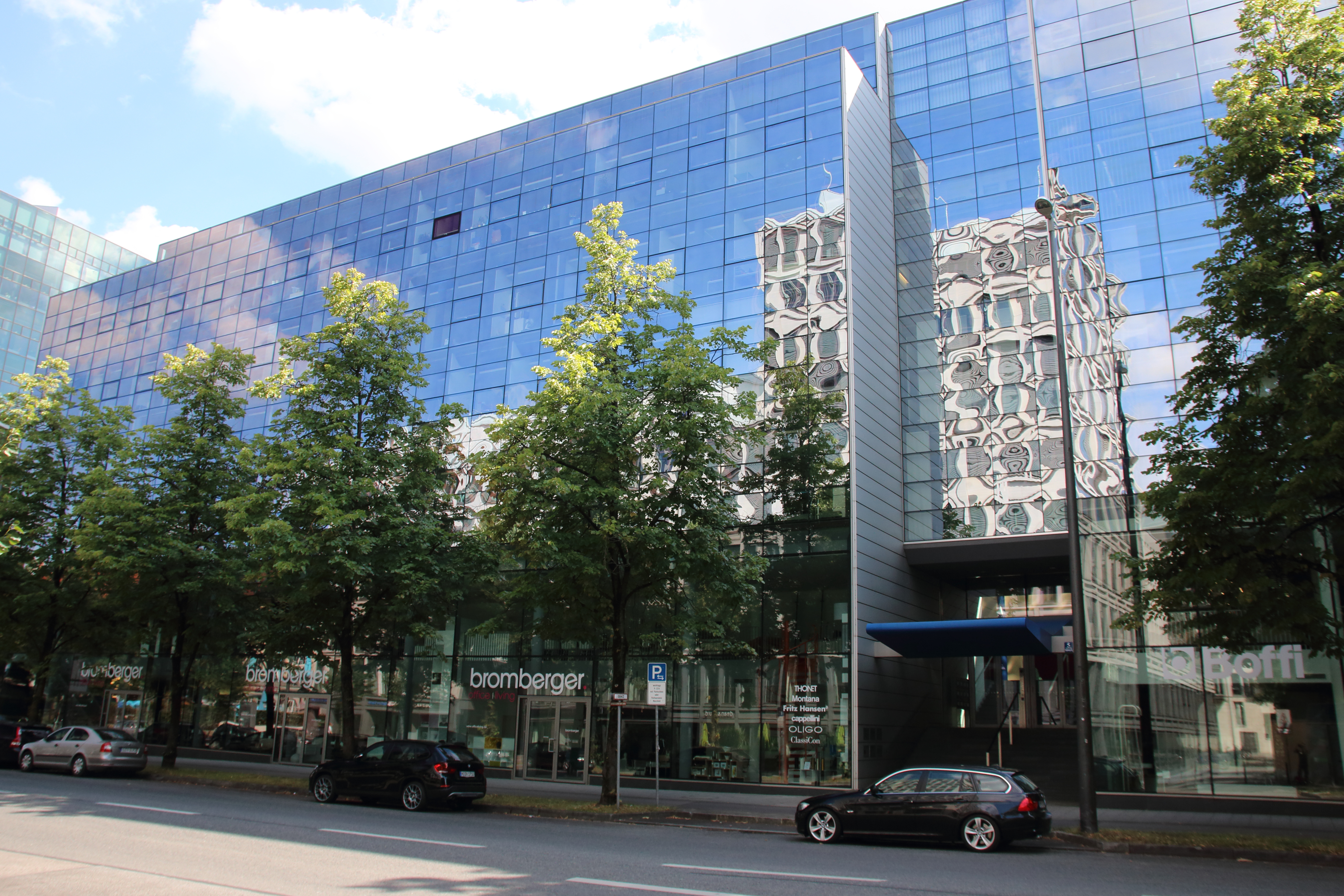 Das Gebäude Nymphenburger Straße 5 in München im Sommer 2016.